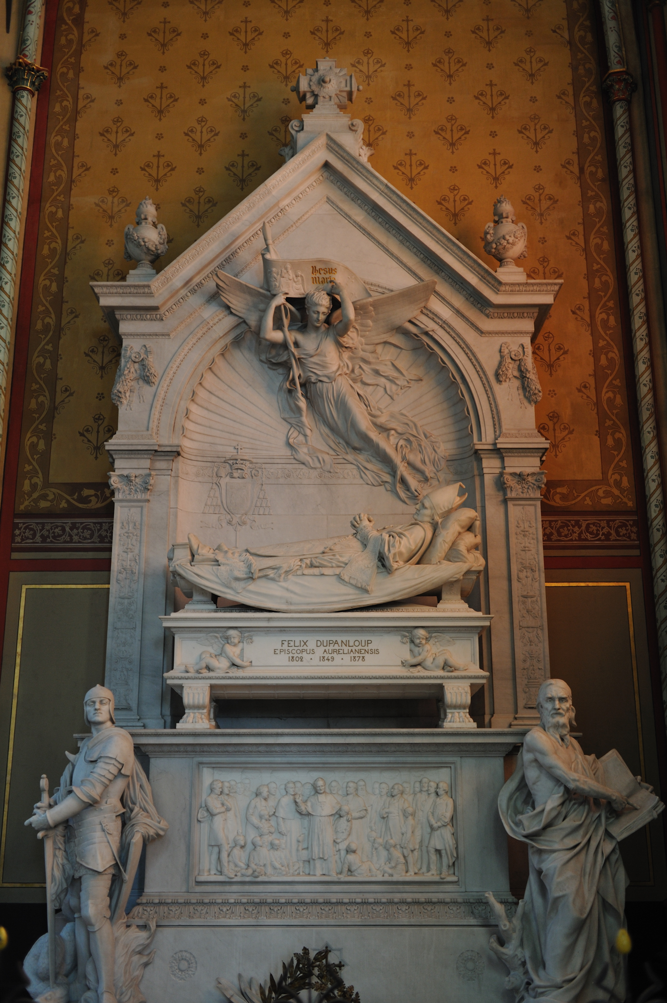 Mausolée érigé en 1888 à l’emplacement du tombeau de Monseigneur Dupanloup, évêque d’Orléans de 1849 à 1878, cathédrale Sainte-Croix, Orléans, France